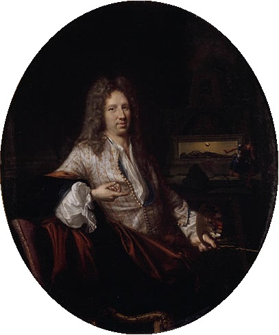 Ancien titre: Le Portrait de cet Artiste, peint par lui-même, et tenant sa palette (Ancien titre)